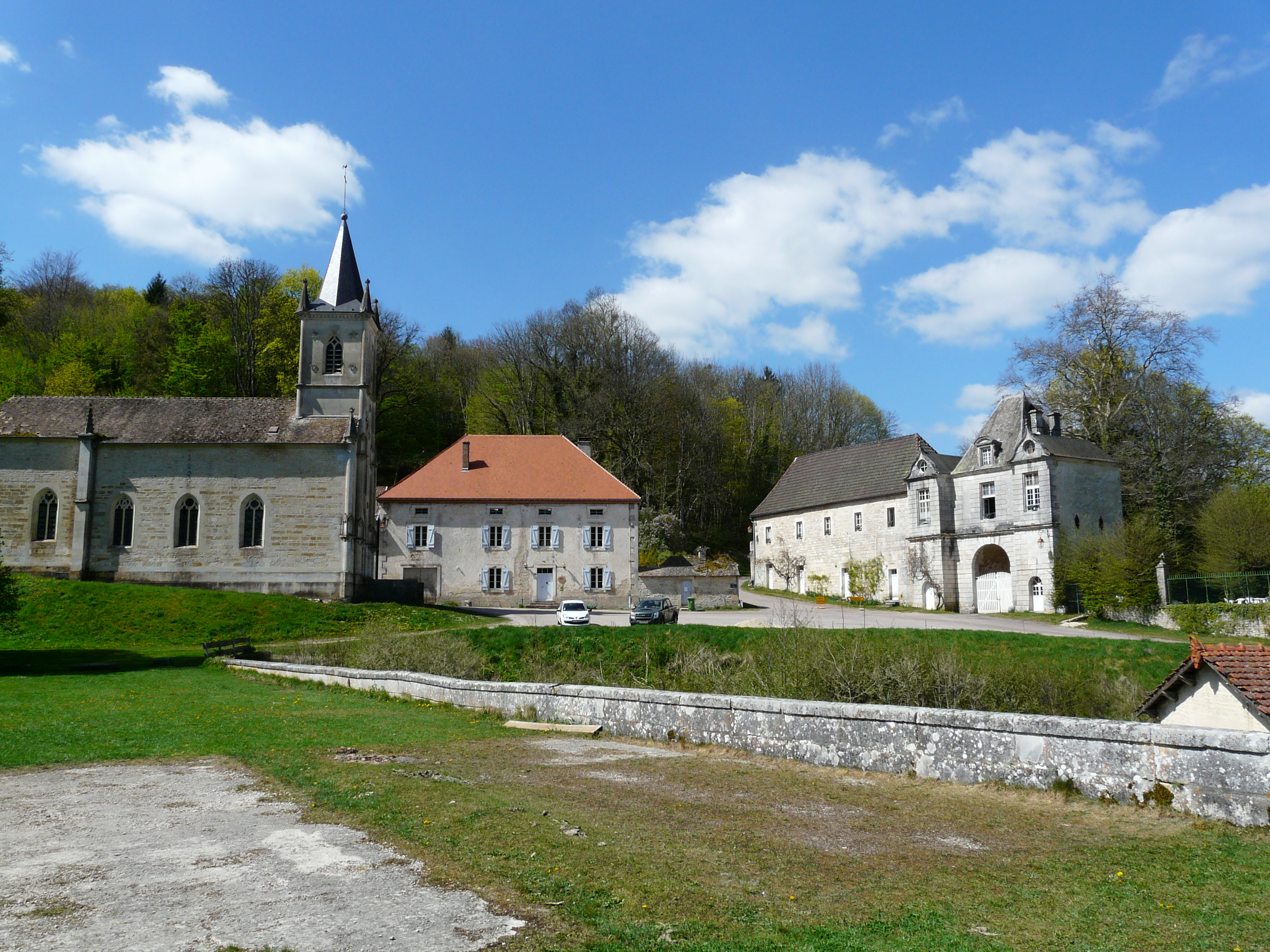 Vue générale du village d'Ecot-la-Combe avec l'église et la porterie du Château notamment.